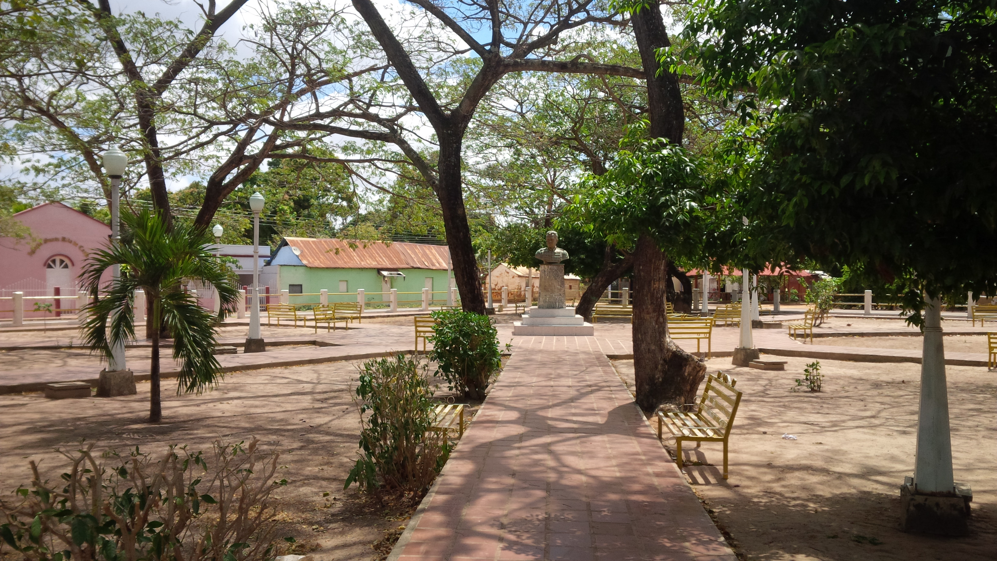 Juan José Rondón, Plaza de Santa Rita de Manapire